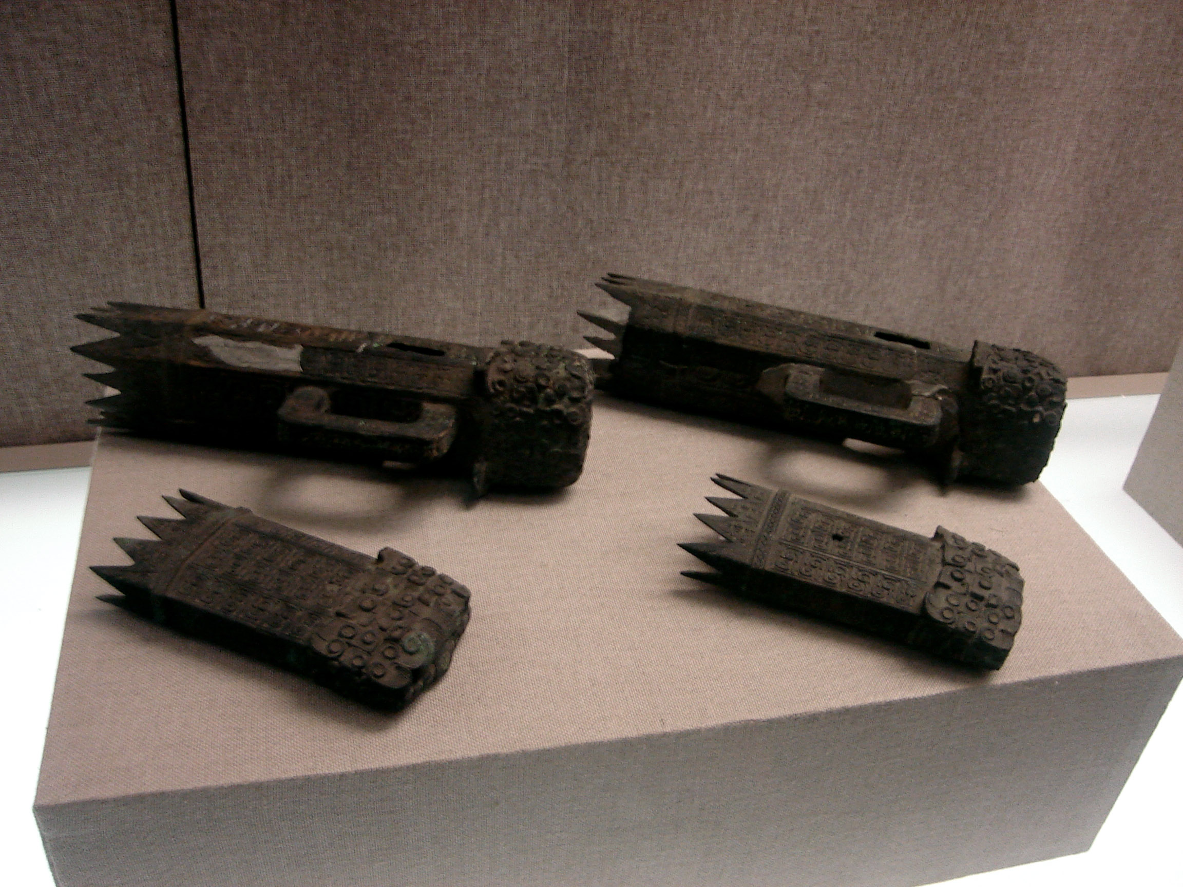 侯古堆一号墓出土铜质轿子杠头饰，现藏于信阳博物馆。